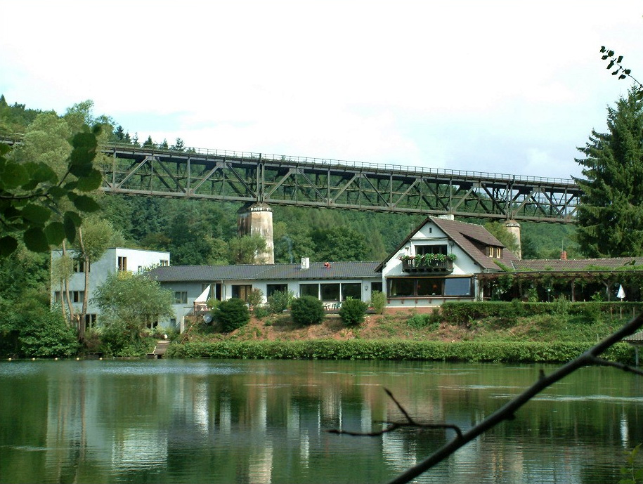 Eiswoog in Pfalz, Western Germany, with the Eistalbahn viaduct in the background